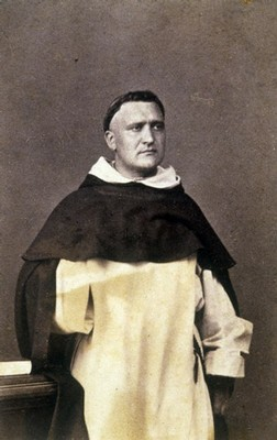 Photo ancienne du Père Jean-Joseph Lataste (1832-1869)